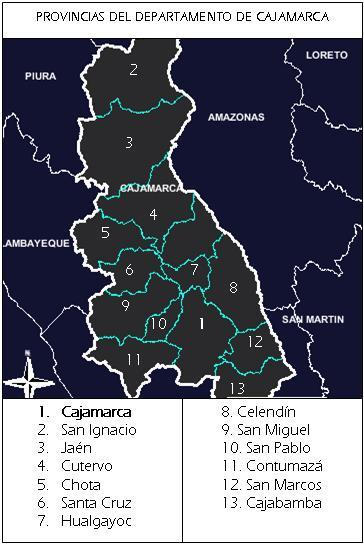 Mapa de Cajamarca provincias